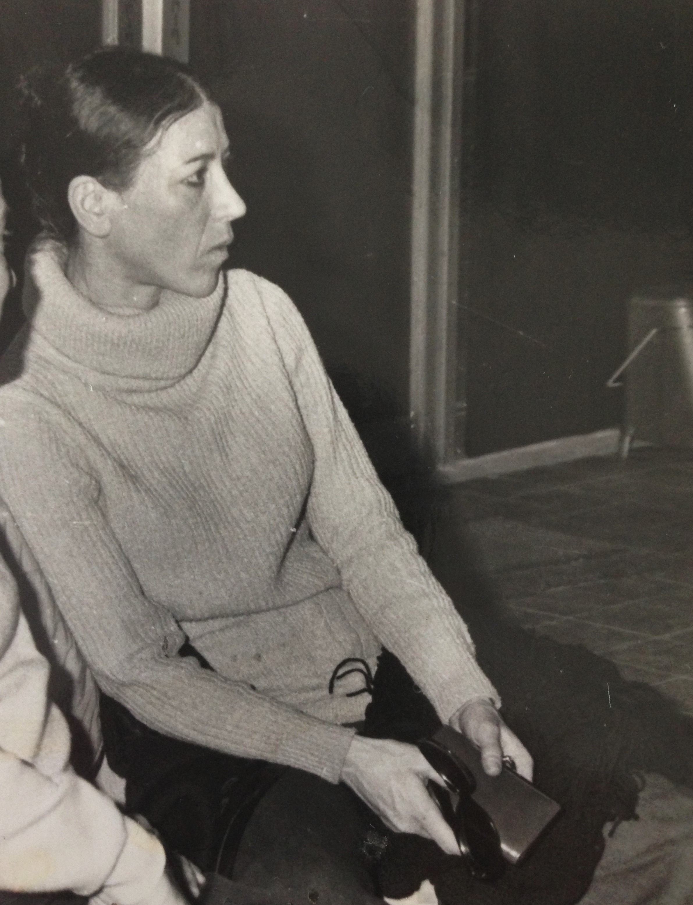 ברטה ימפולסקי צופה בחזרה בבלט